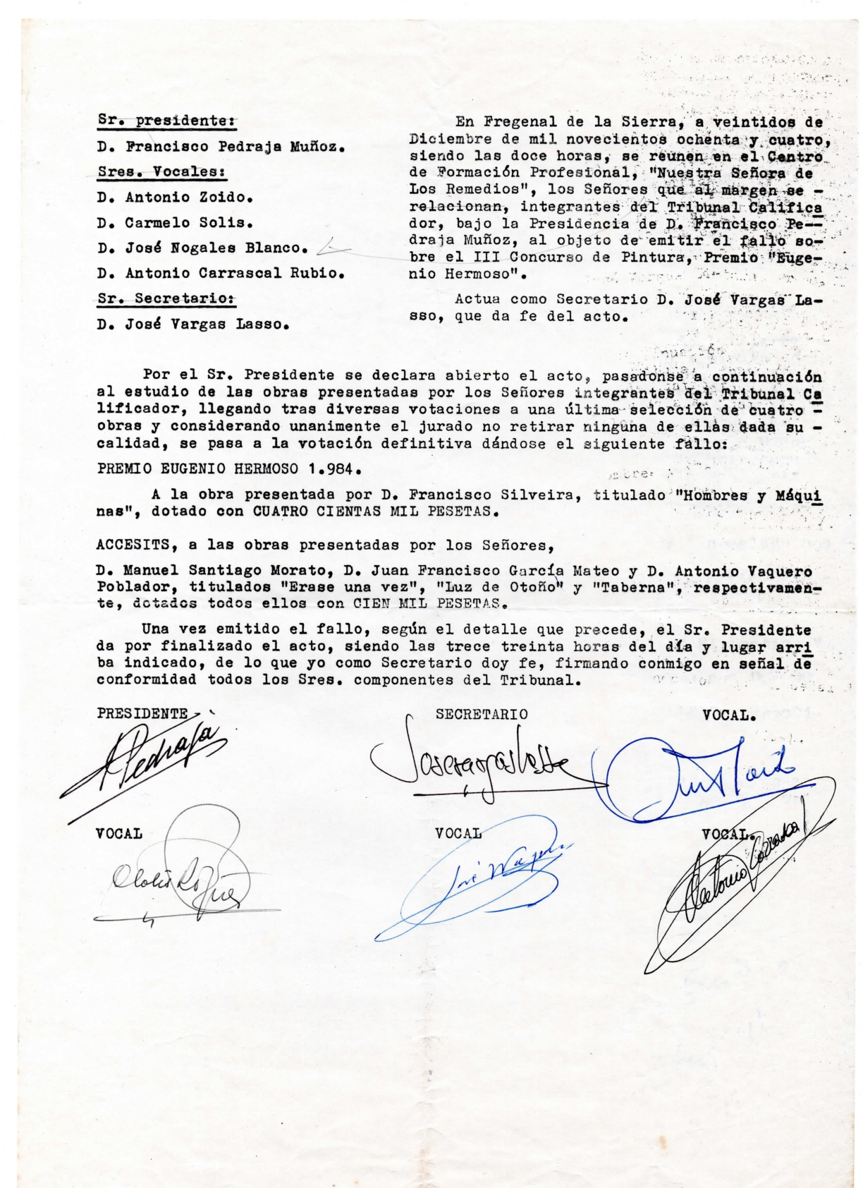 Acta del "III Concurso de Pintura Eugenio Hermoso" convocado por la Diputación Provincial y el Ayuntamiento de Fregenal de la Sierra (Badajoz), emitida con fecha 22 dic. 1984.